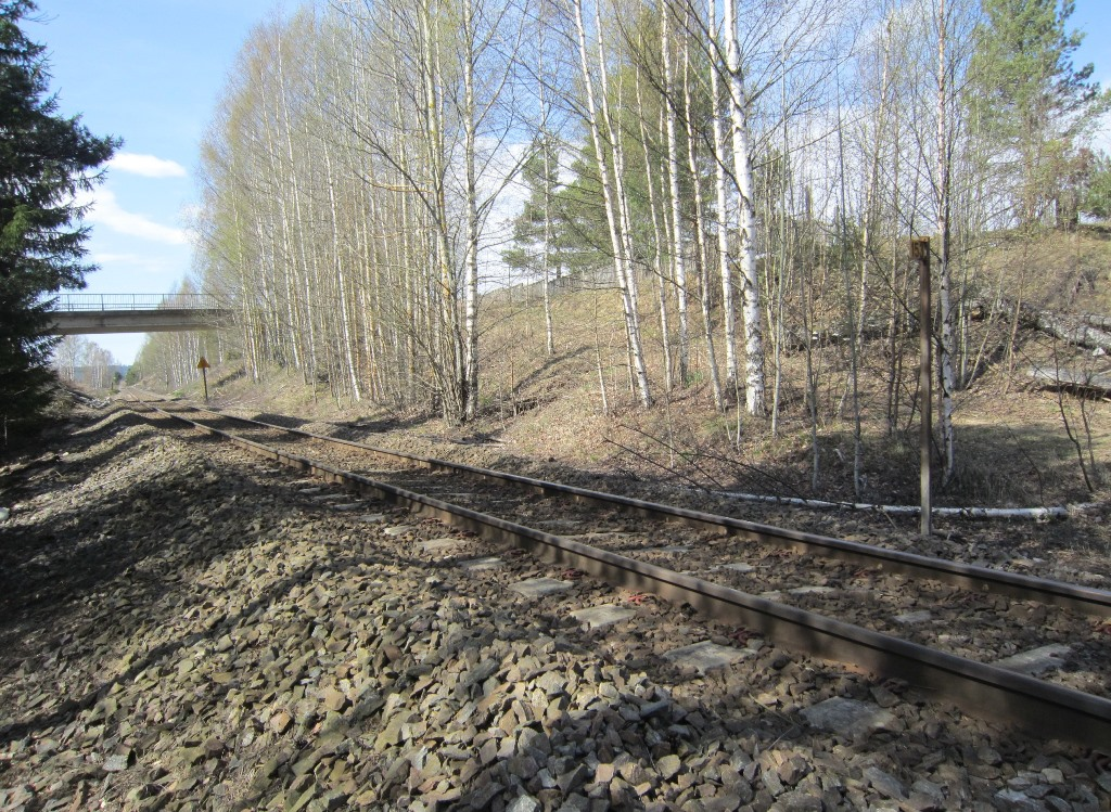 Her lå i sin tid Åsnes kirke holdeplass på Solørbanen.